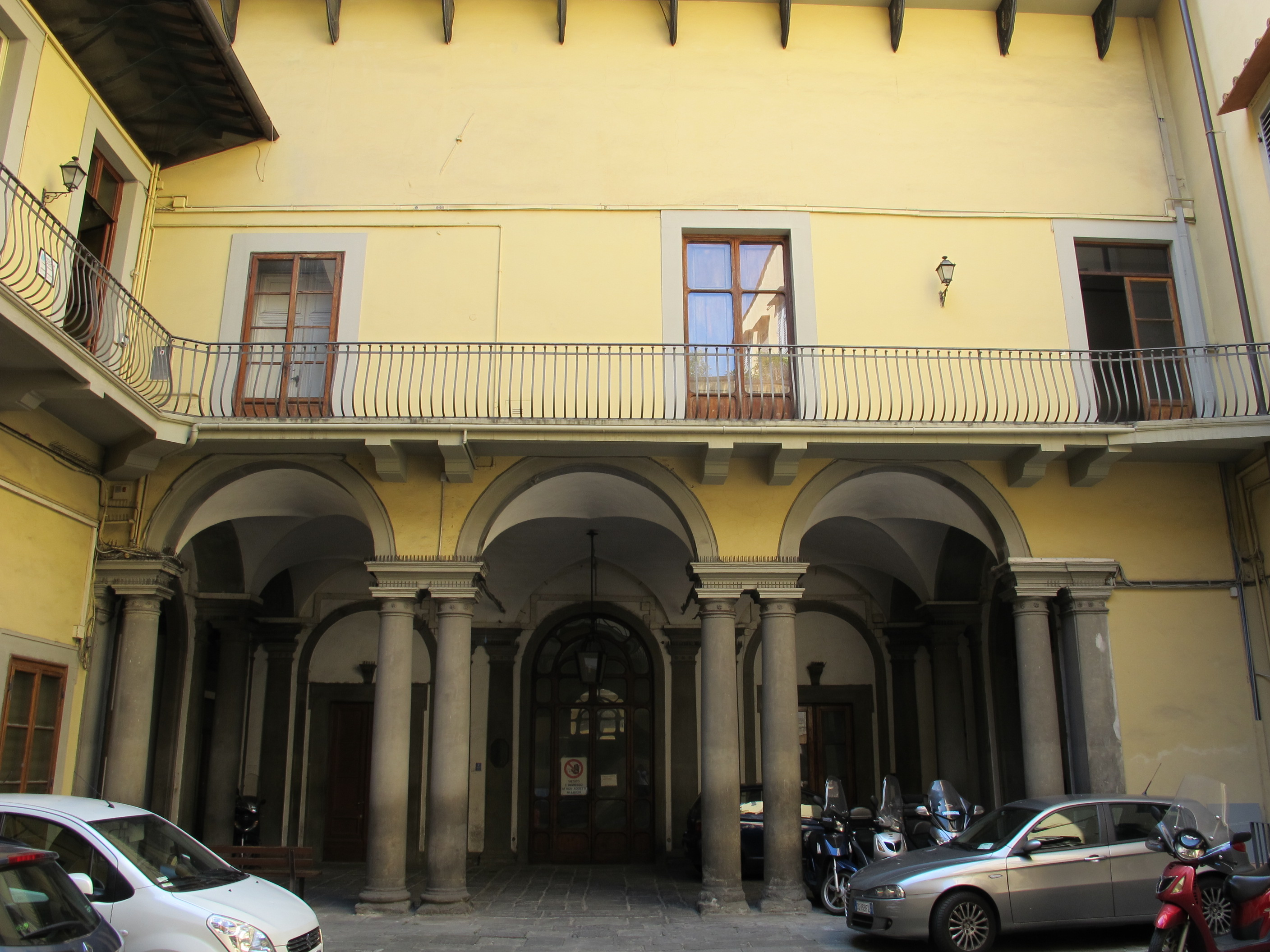 Palazzo pucci, cortile 3